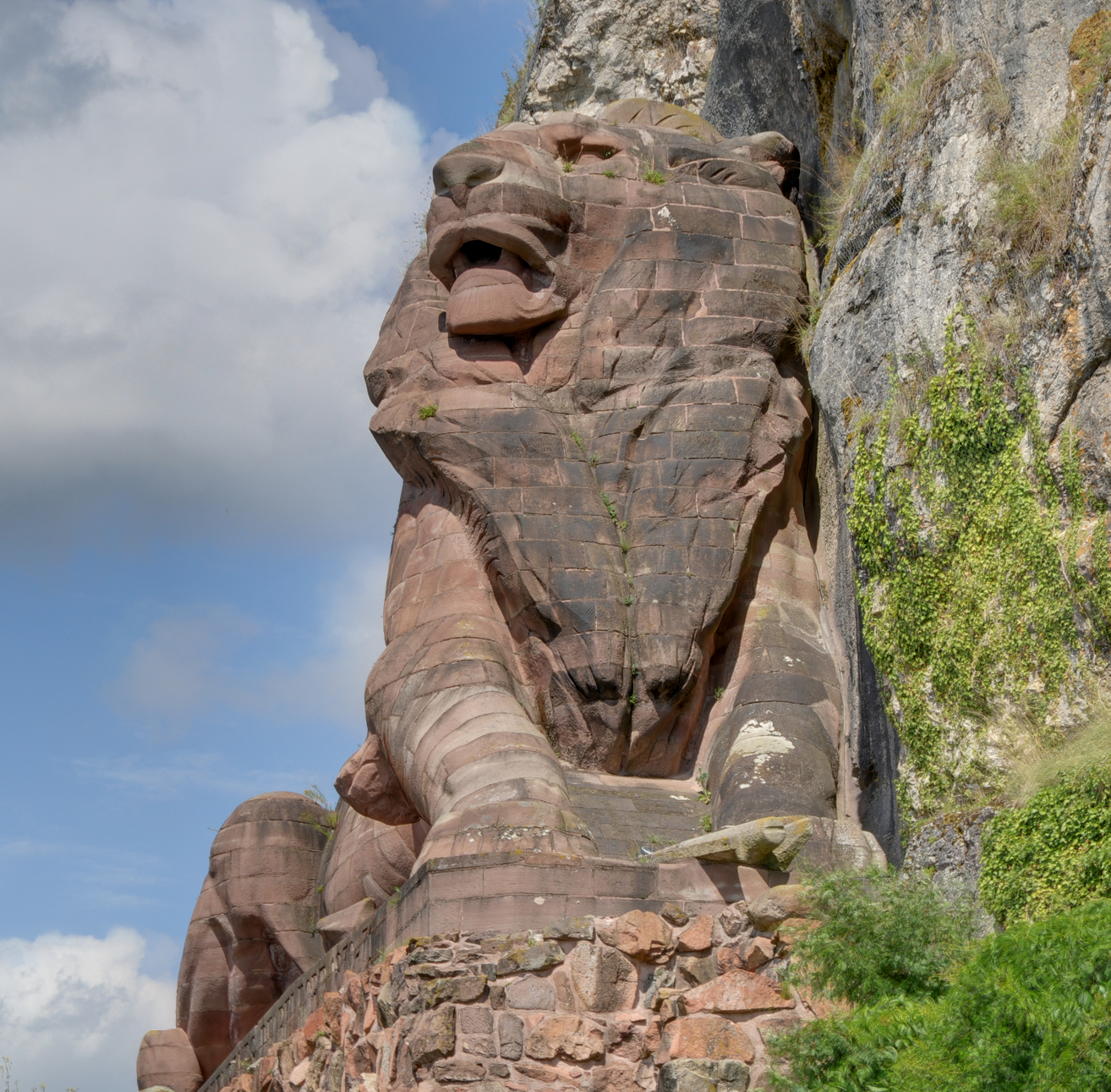 Lion de Belfort. Belfort fortifications (HDR).